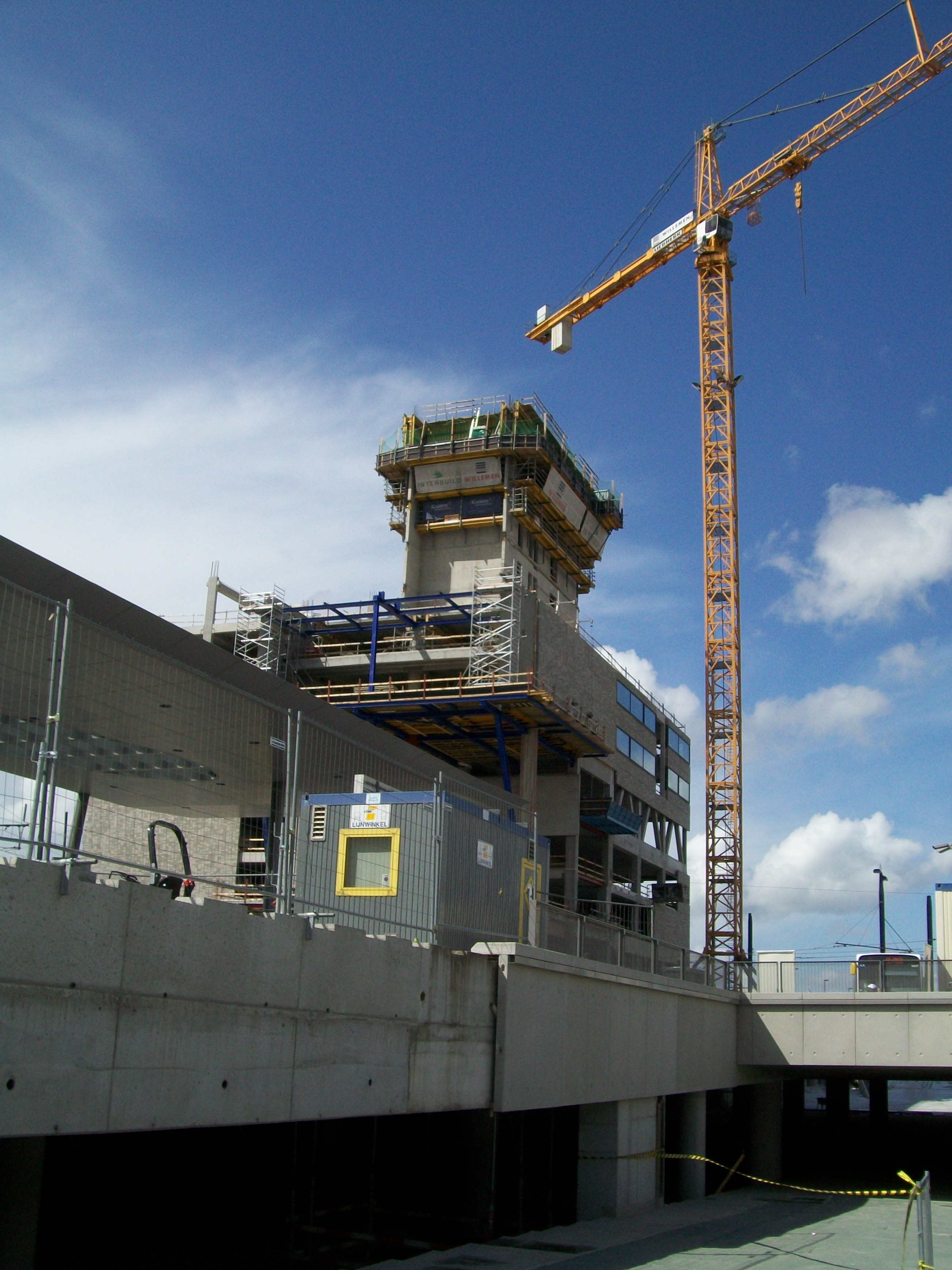 Virginie Lovelinggebouw (Gent) in aanbouw